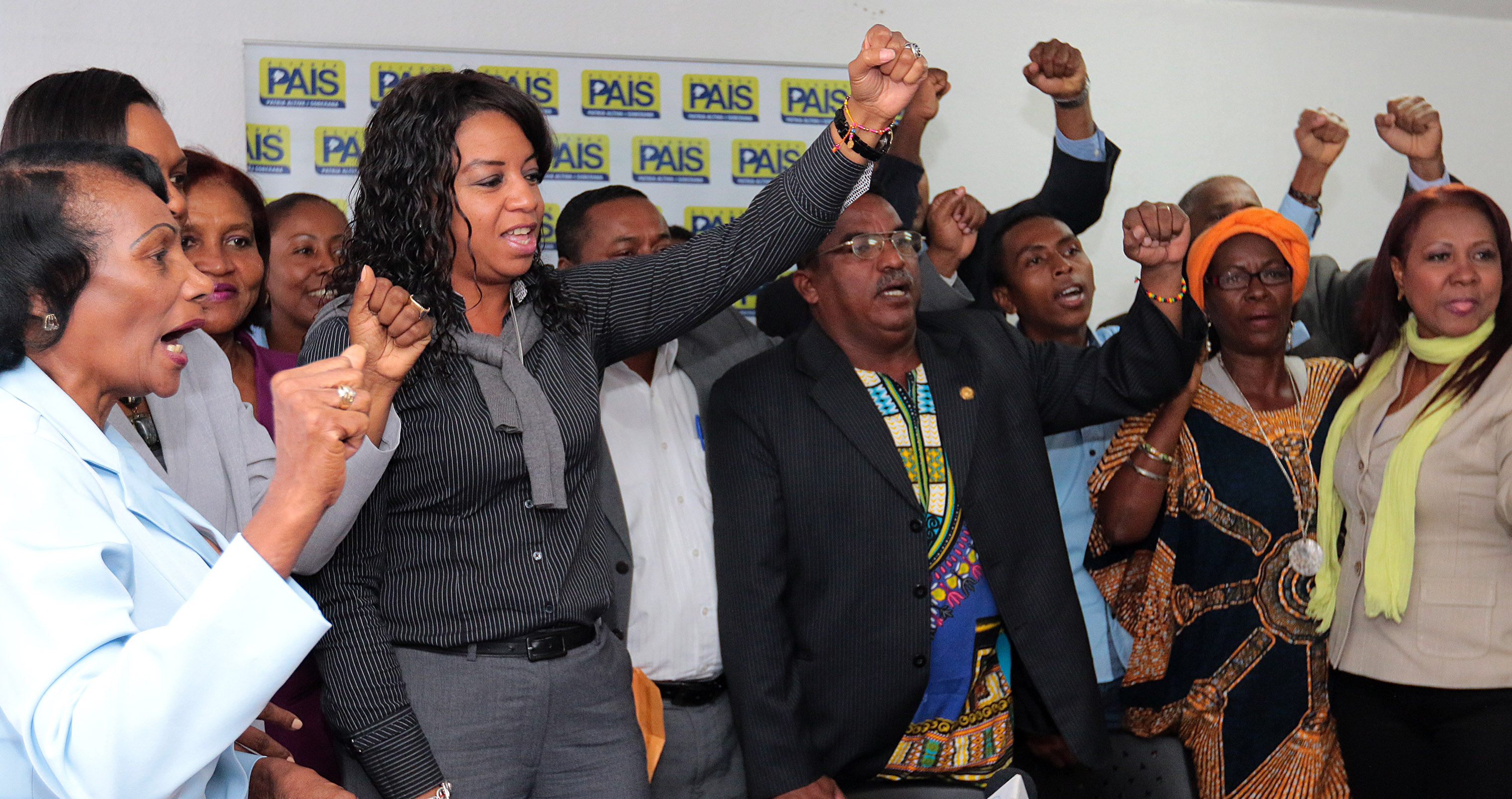 Des personnalités afroéquatoriennes lors d'un rassemblement d'Alianza Pais en soutien au gouvernement de Rafael Correa le 10 août 2015. Trois personnalités sont identifiées par l'agence, de g. à d. : Alexandra Ocle, le poing gauche levé ; Gisela Chala, le poing gauche levé avec un chemisier coloré, et Cecilia Angulo, avec une écharpe jaune.